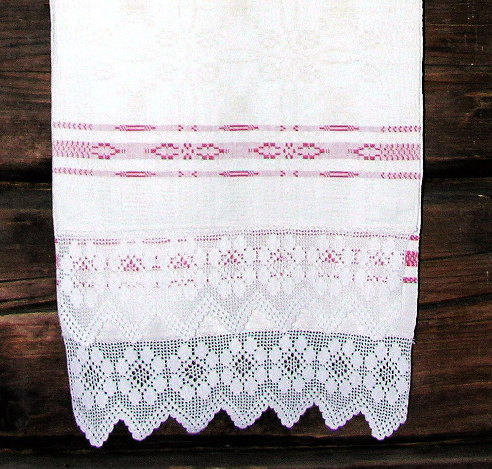 Žemaitėška: Abrūsos, 2007-04-21, Žemaitėjė